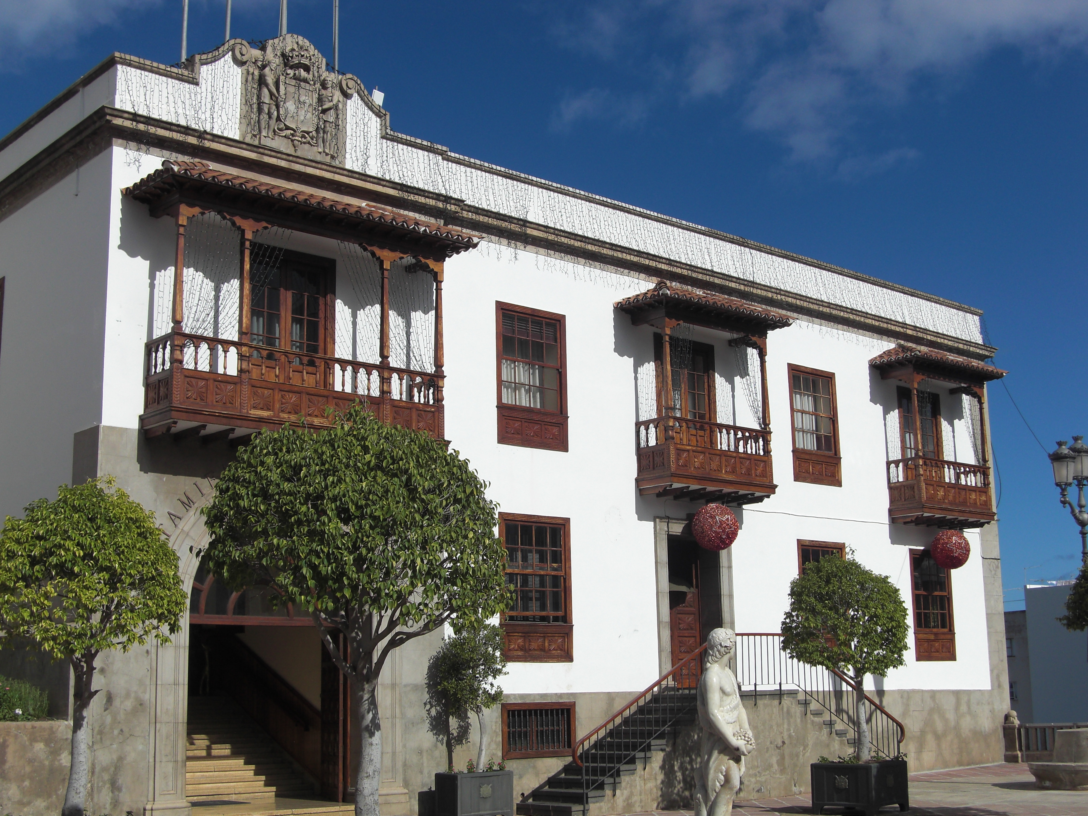 Edificio del Ayuntamiento de Icod de los Vinos